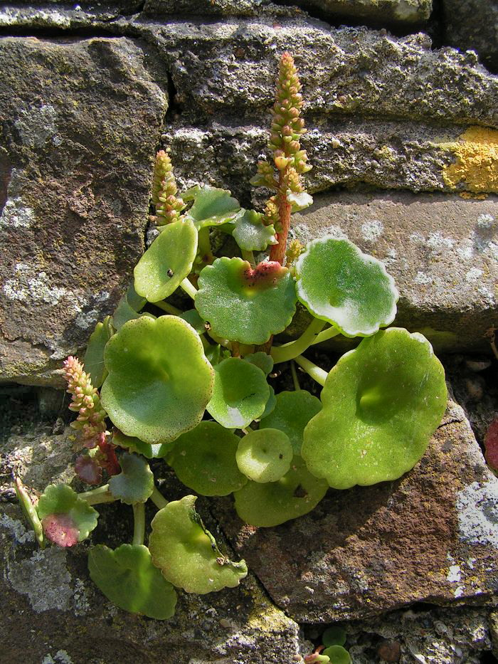 Fielsennuebelkraut